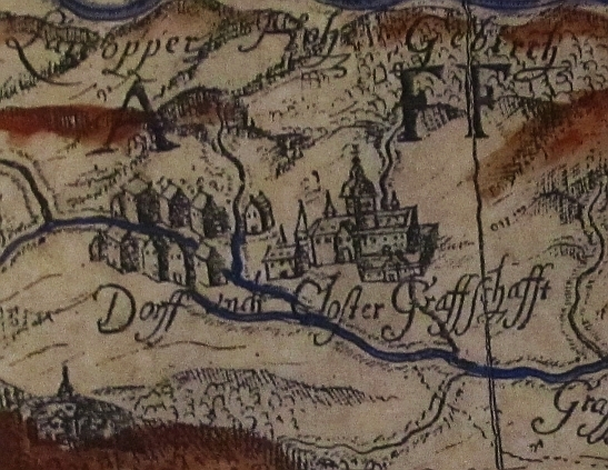 Auszug Jagdgrenzkarte (Grenzen Landt und Jagtt der Herren Graffen von Wittgenstein und Berleburg), Erbvodey Graffschafft und Gericht Oberkirchen, Anno 17. Nouembris 1653 (Germany)